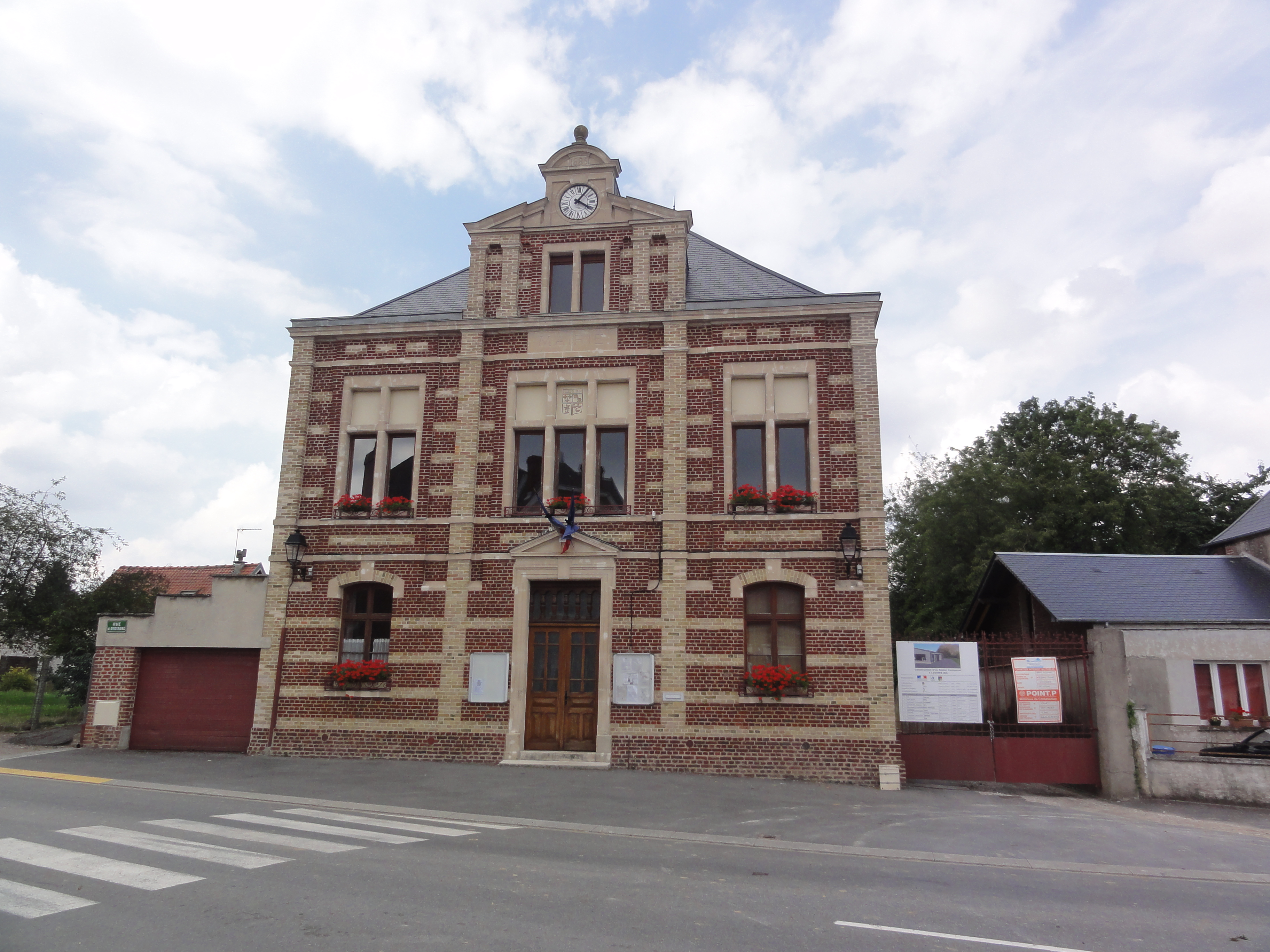 Lesdins (Aisne) mairie